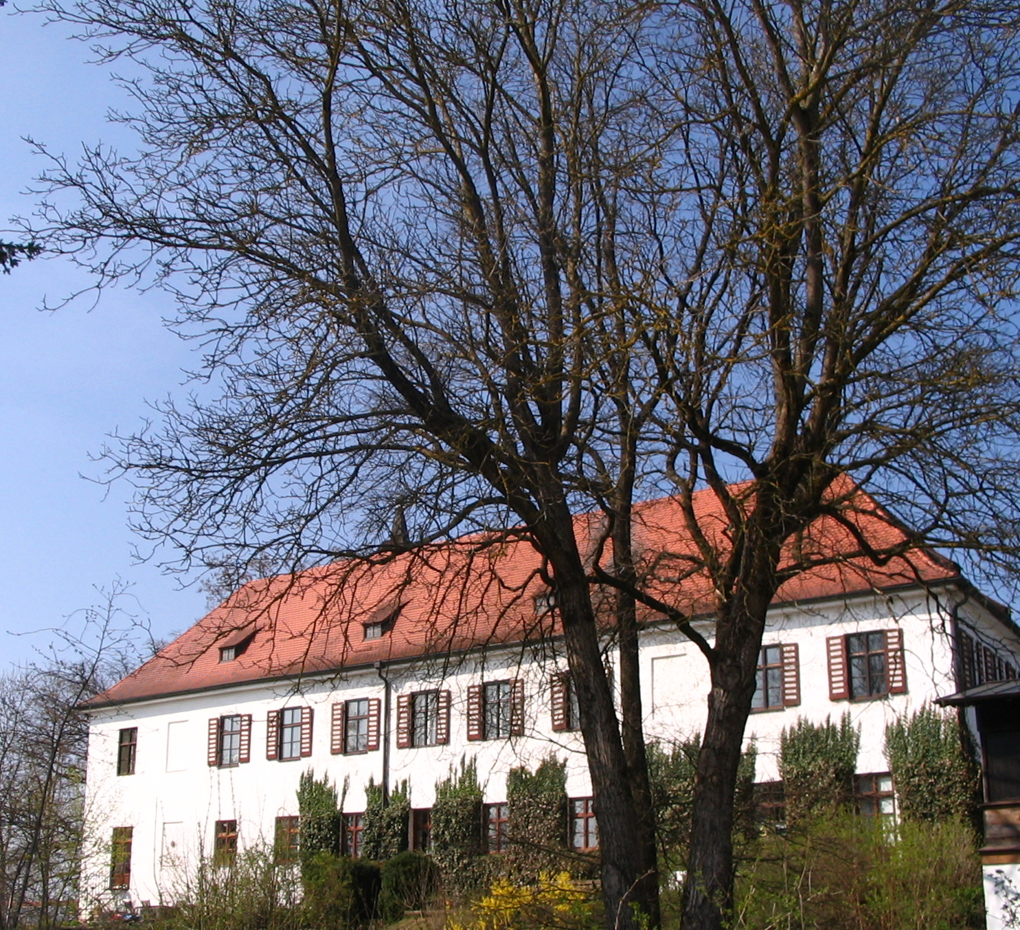 Elsendorf, Ortsteil Ratzenhofen, Landkreis Kelheim, Niederbayern: Schloss Ratzenhofen